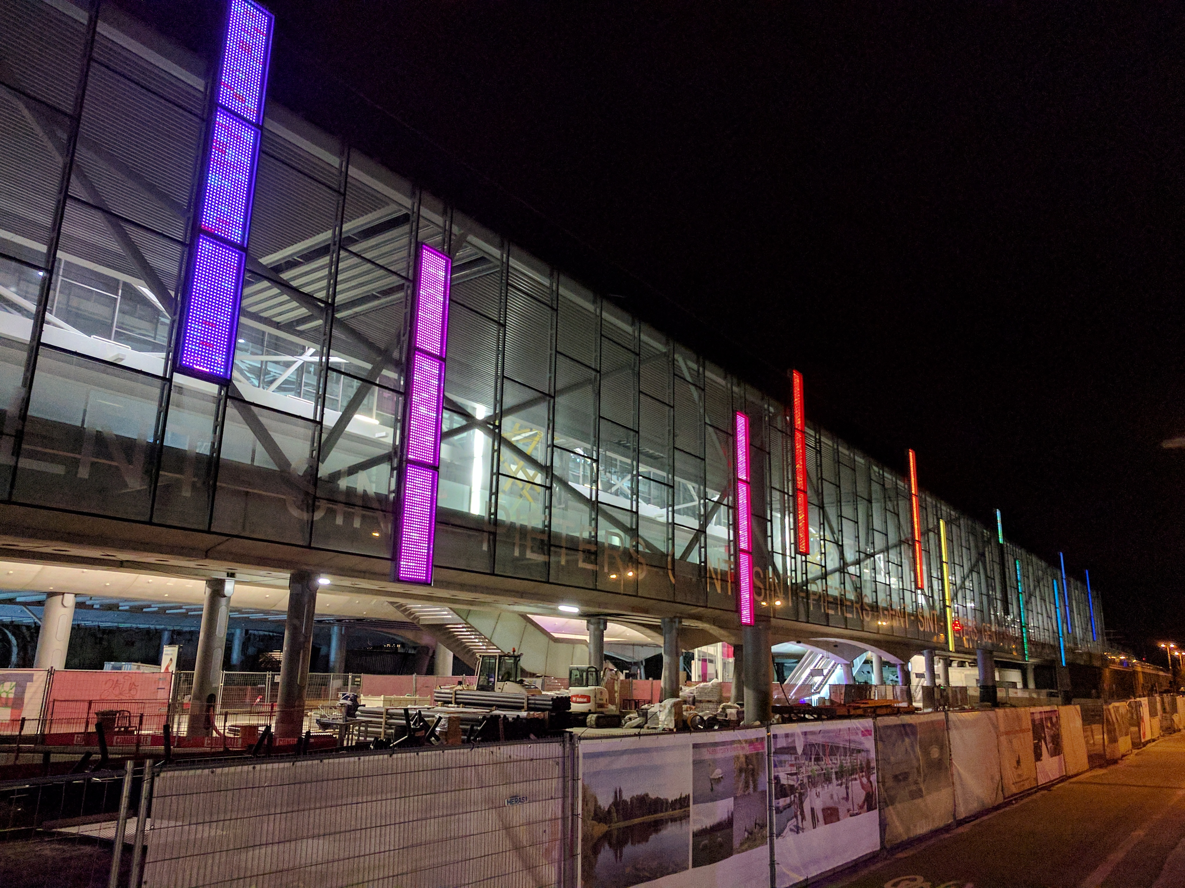 De achtergevel (aan de kant van het toekomstige Koningin Mathildeplein) van het station Gent-Sint-Pieters met de lichtgevende panelen.